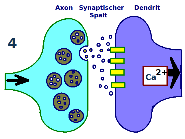 Langzeit-Potenzierung Vierte Stufe